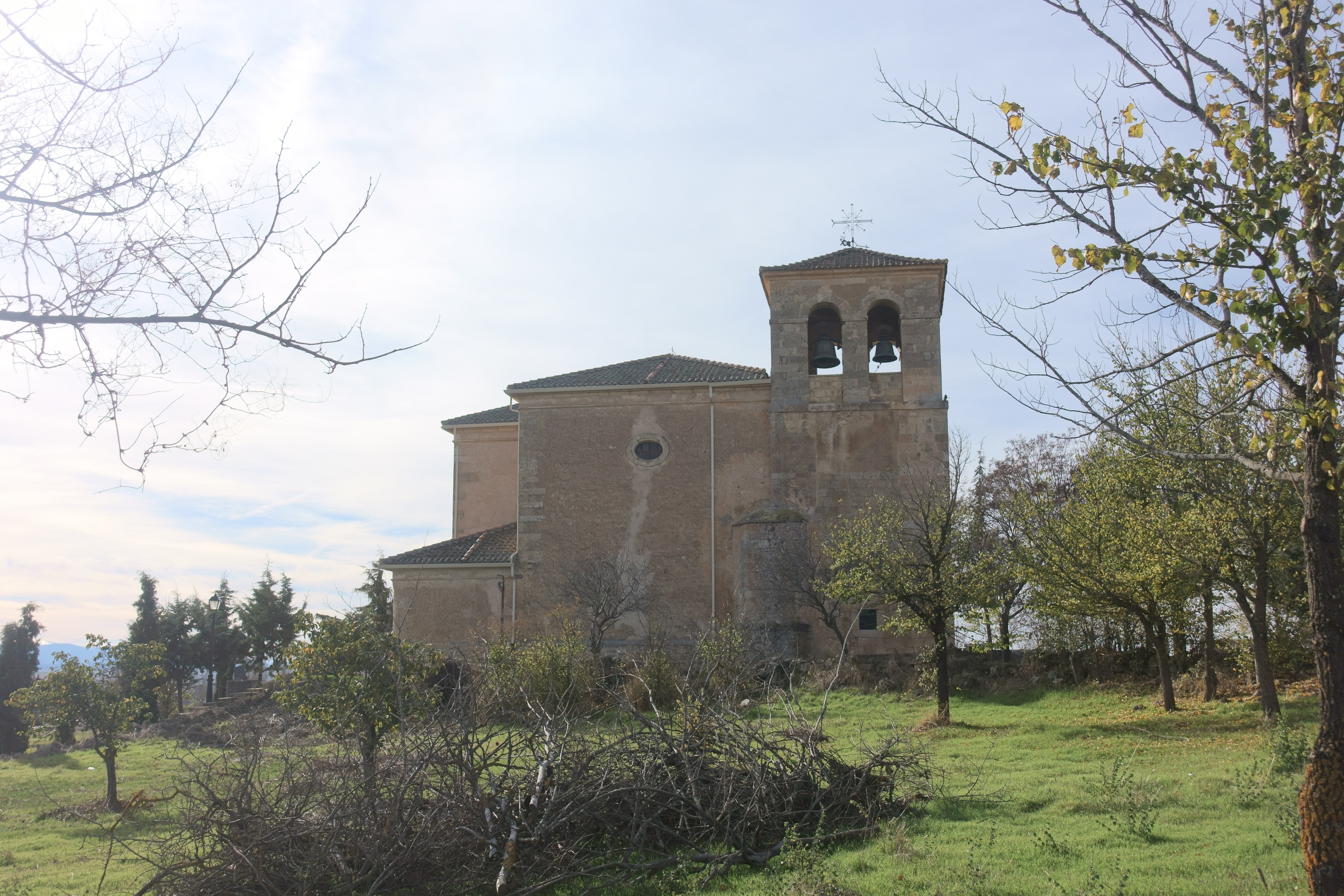 Iglesia de San Vitores, en Grajera (Segovia, España).